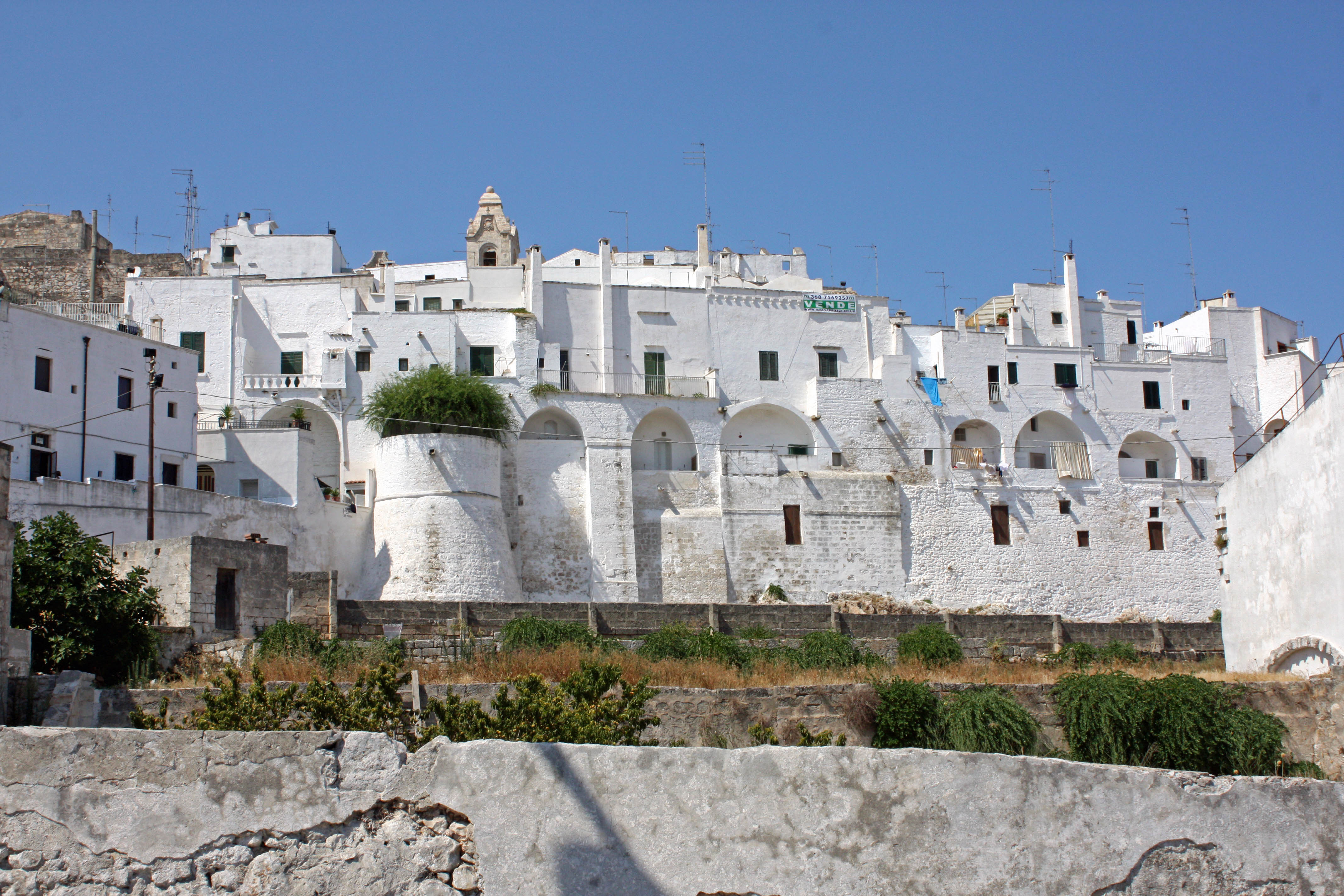 Ostuni: la Città Bianca